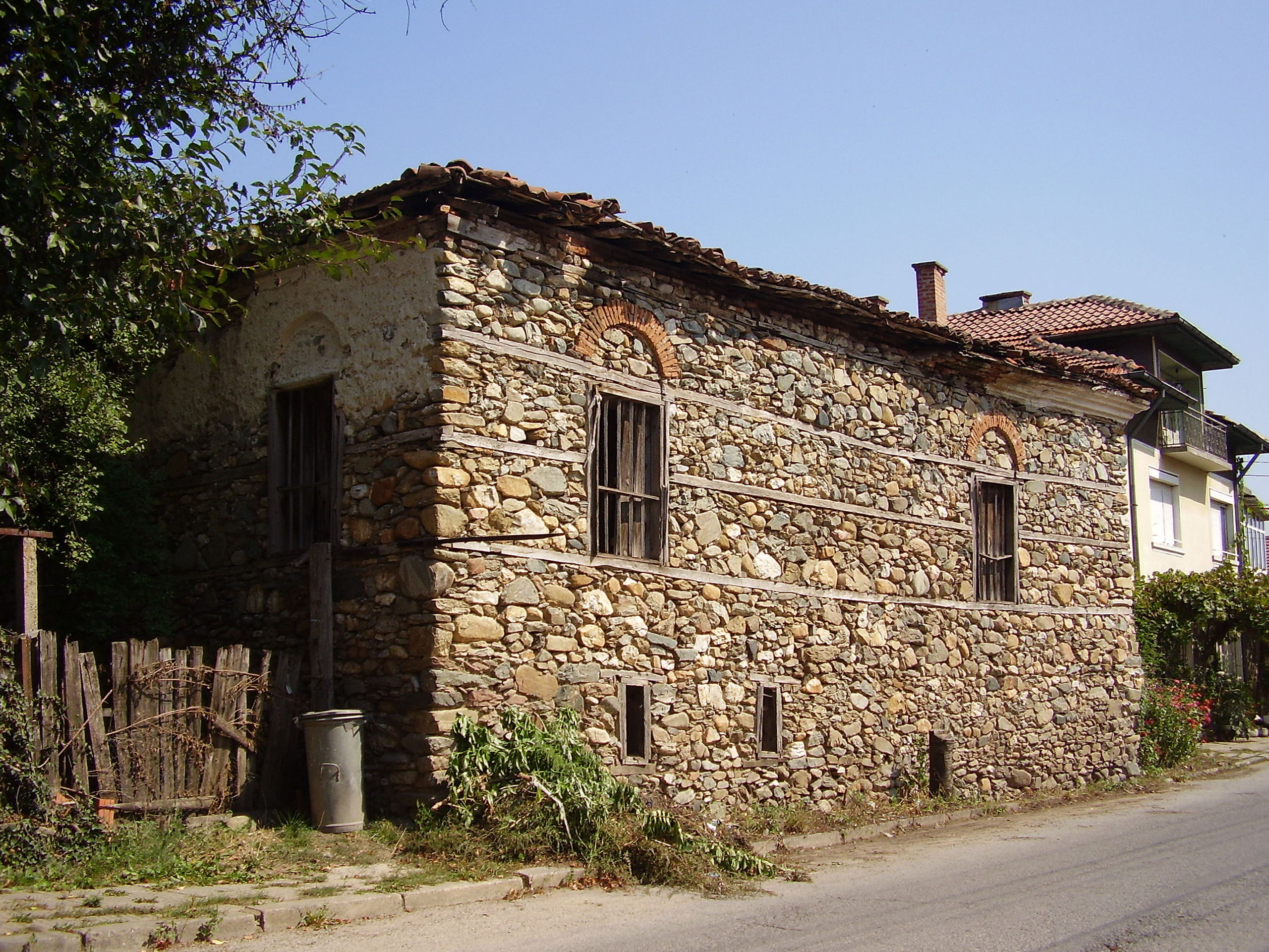 Владишката кула - с.Соволяно